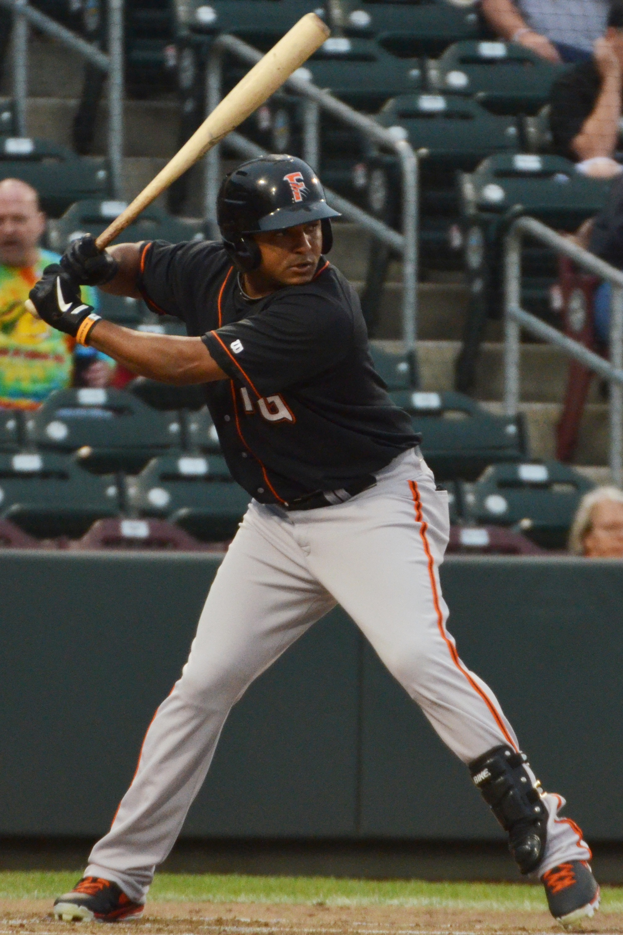 Tony Abreu